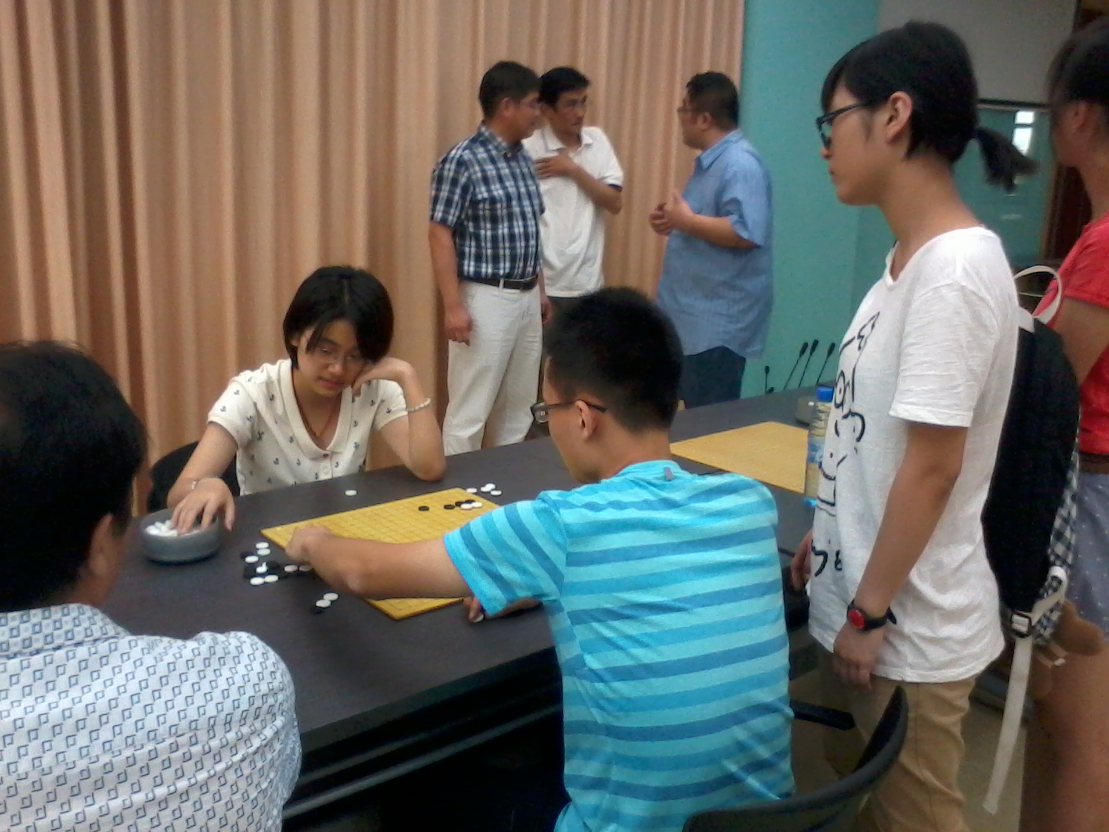 2014年7月21日，於之瑩五段來到無錫一中下指導棋，與五人進行車輪戰。